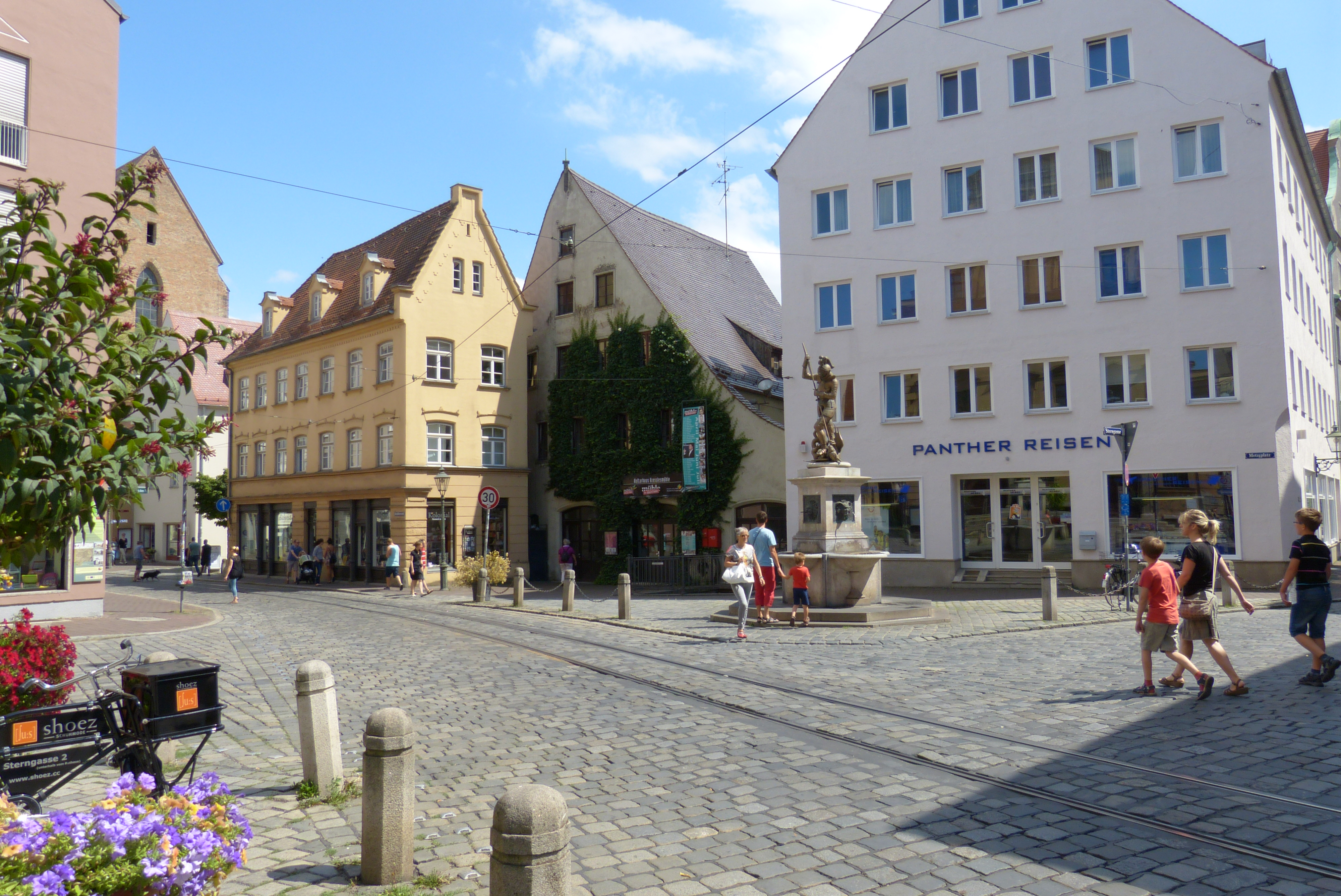 Metzgplatz in Augsburg mit St.-Georgs-Brunnen